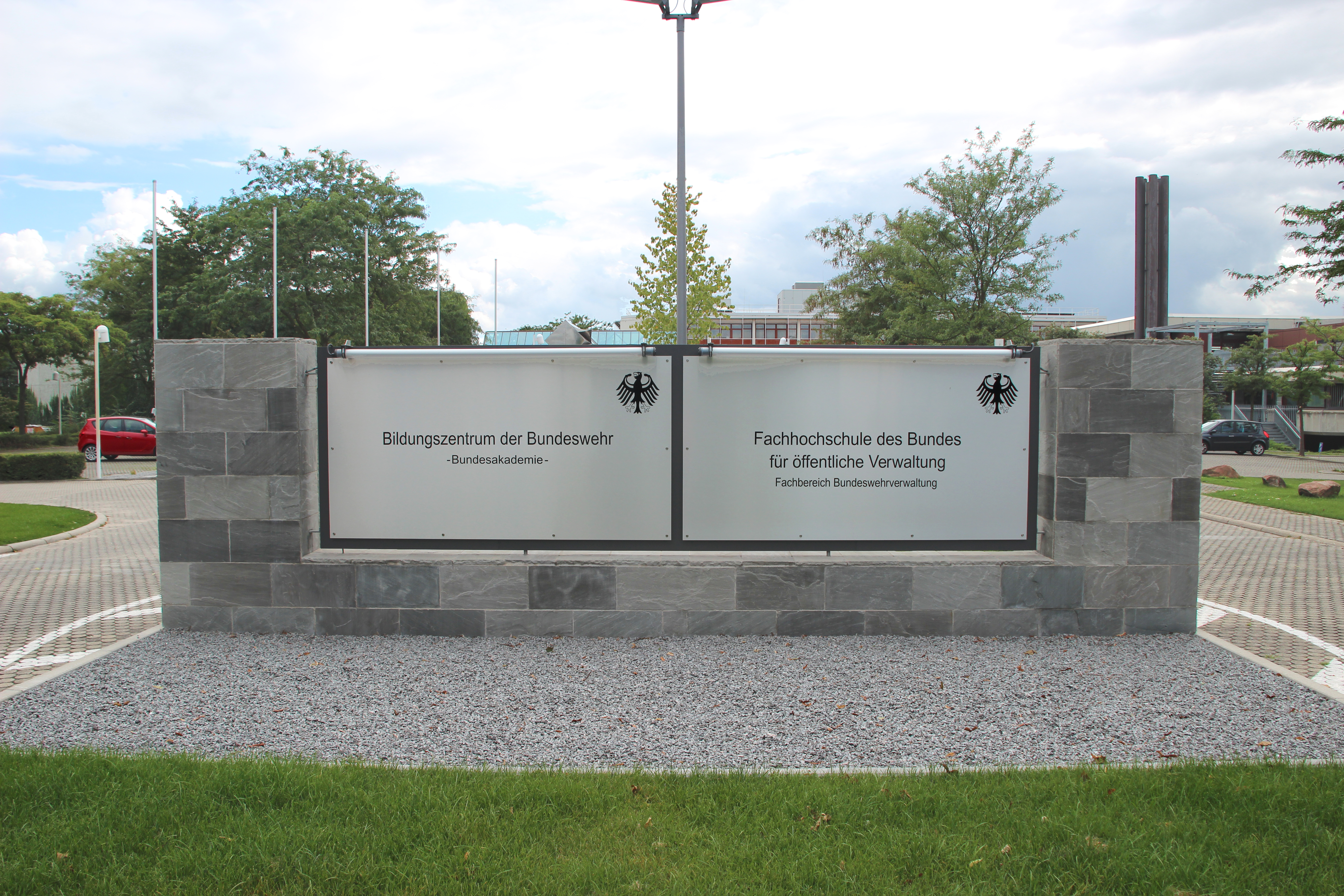 Bildinhalt: Bildungszentrum der Bundeswehr in Neuostheim Aufnahmeort: Mannheim, Deutschland